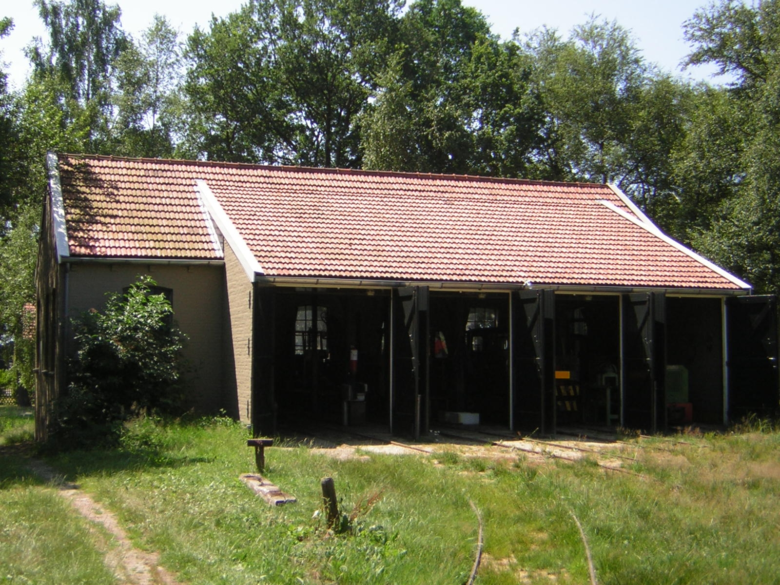 ISM remise